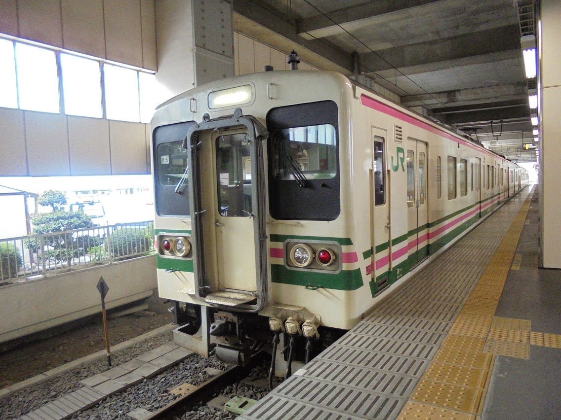 日本國鐵107系電聯車於小山站。